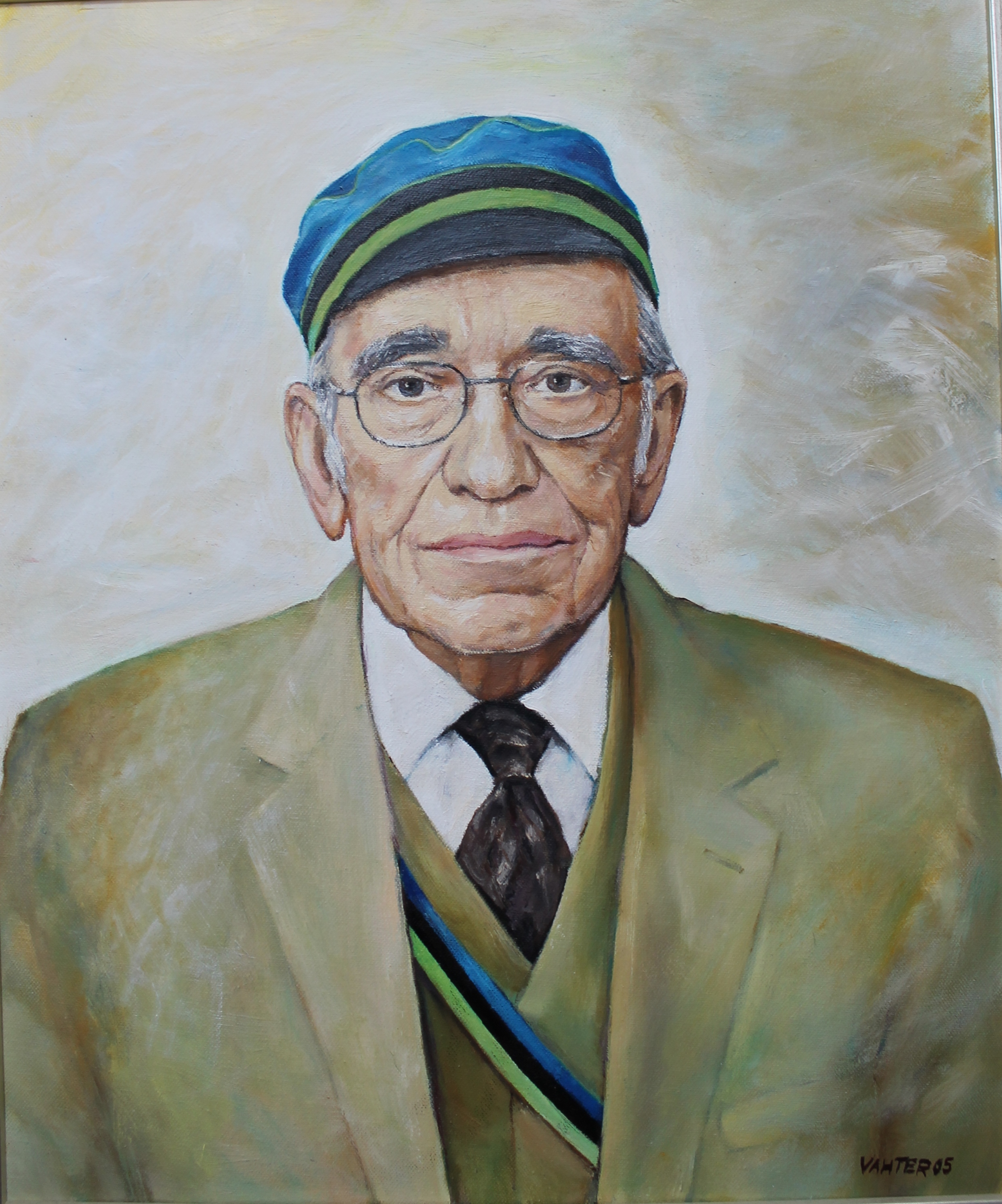 portreemaal Ülo Kurvits. Kunstnik Kuulo Vahter, maalitud 2005